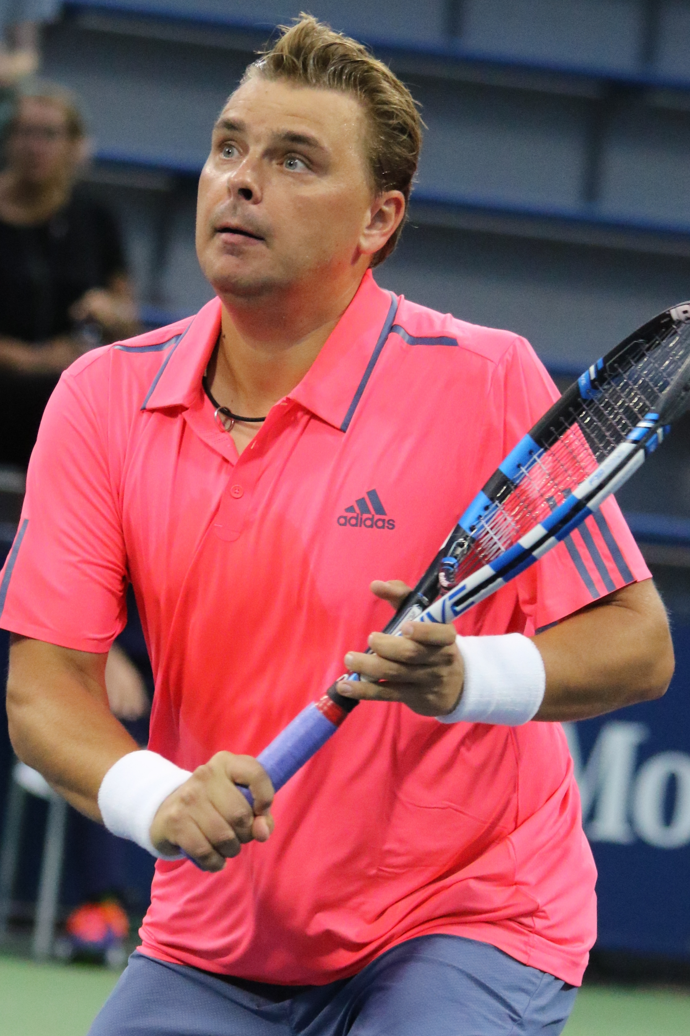 Matkowski US16 (15)